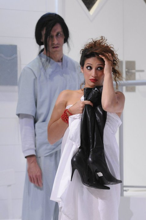 מירב שירום בהצגה קן הקוקיה